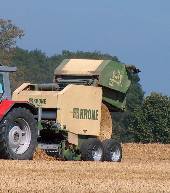 VarioPack-Rundballenpresse der Firma Krone Landmaschinen